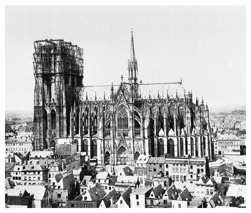 Kölner Dom von Süden, Türme im Bau, Neg.-Nr. RBA 42.780, Aufnahme 1875 (Rheinisches Bildarchiv Köln)